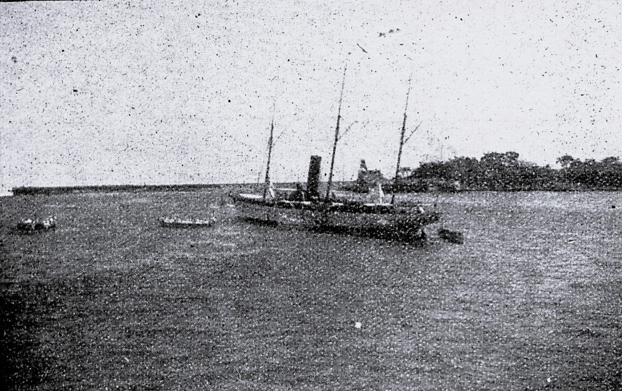 Die deutsche Mannschaft verlässt den Restaurador.